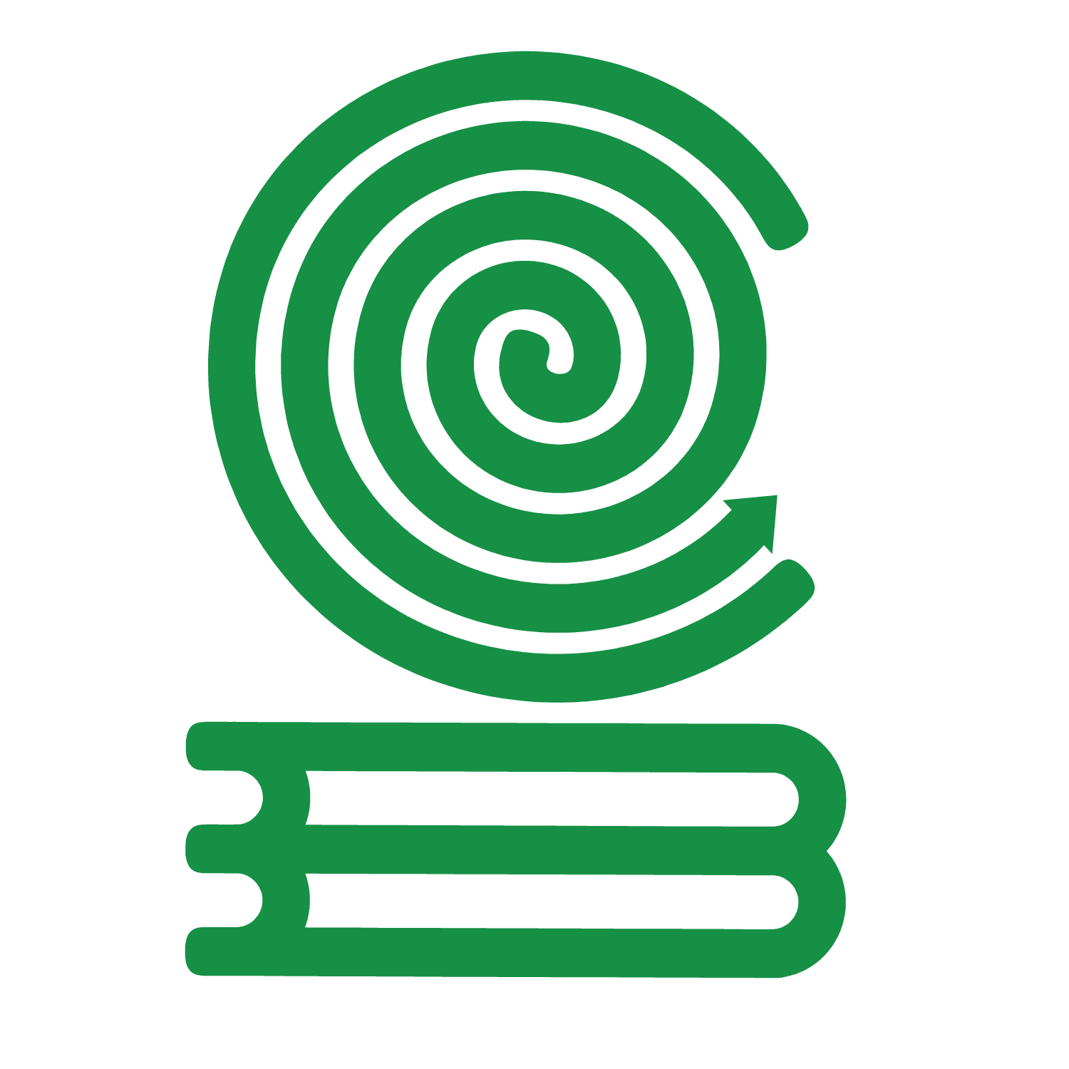 Logotipo Colegio de Bachilleres